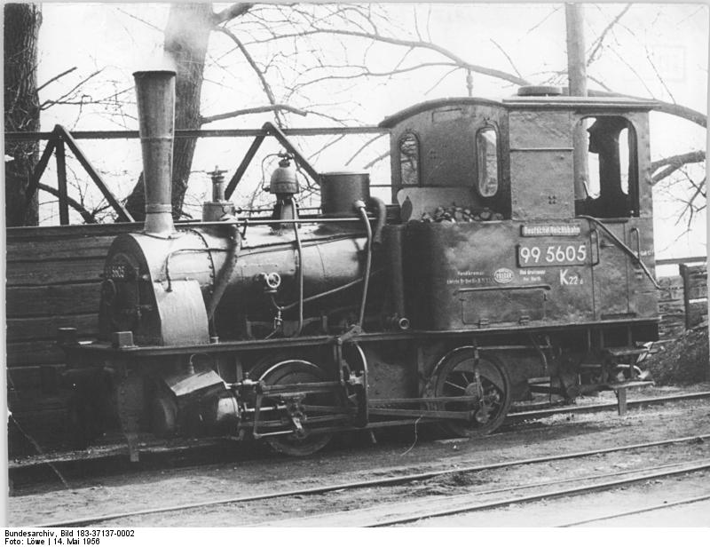 Dampflok 99 5605 (BR 99) Zentralbild Rostock-Löwe 14.5.56 Die zweiachsige Lokomotive 995605 (1000 mm Spurweite) auf der Strecke.